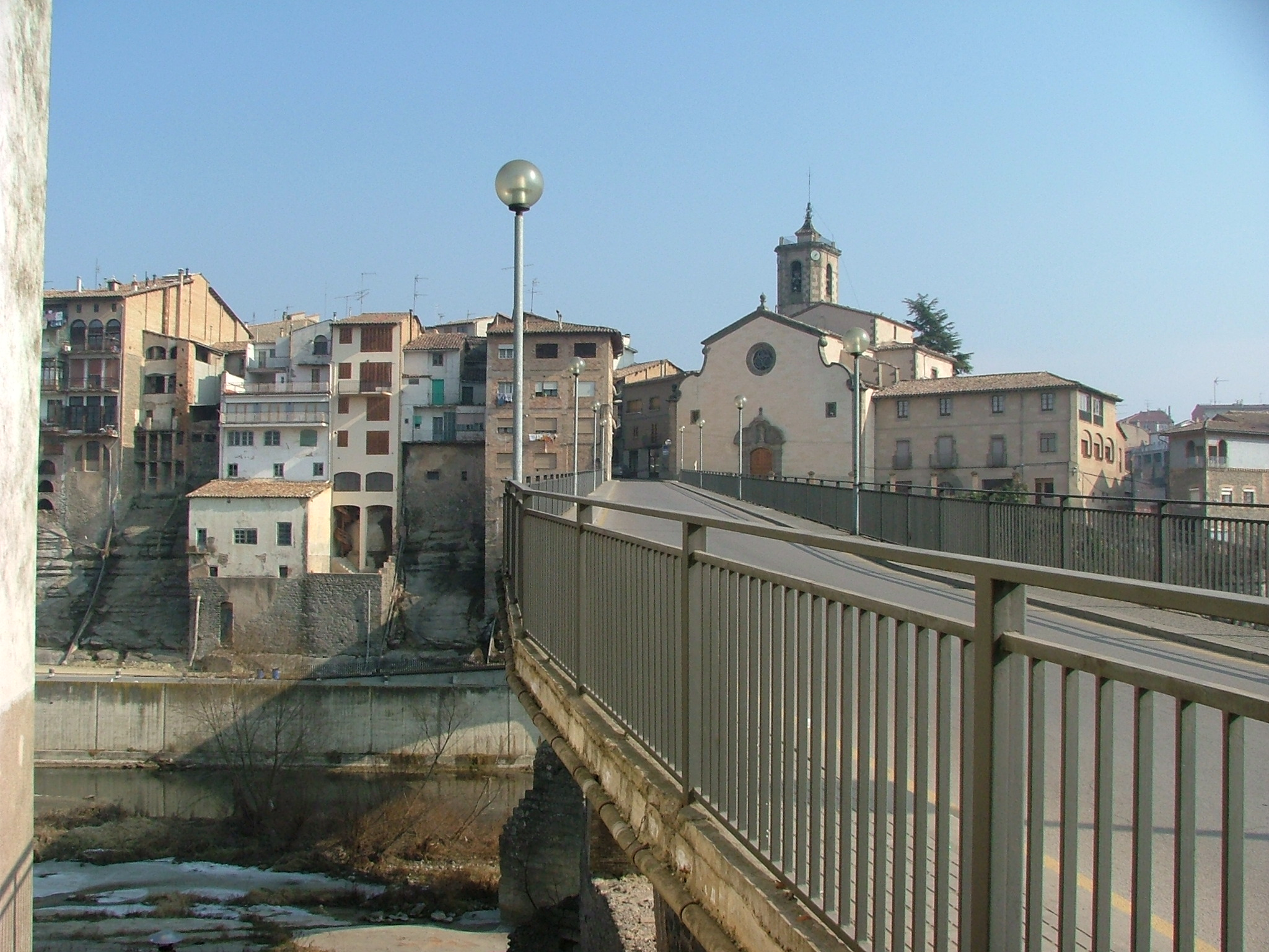 Església de St.Pere de Roda al capdamunt del pont vell